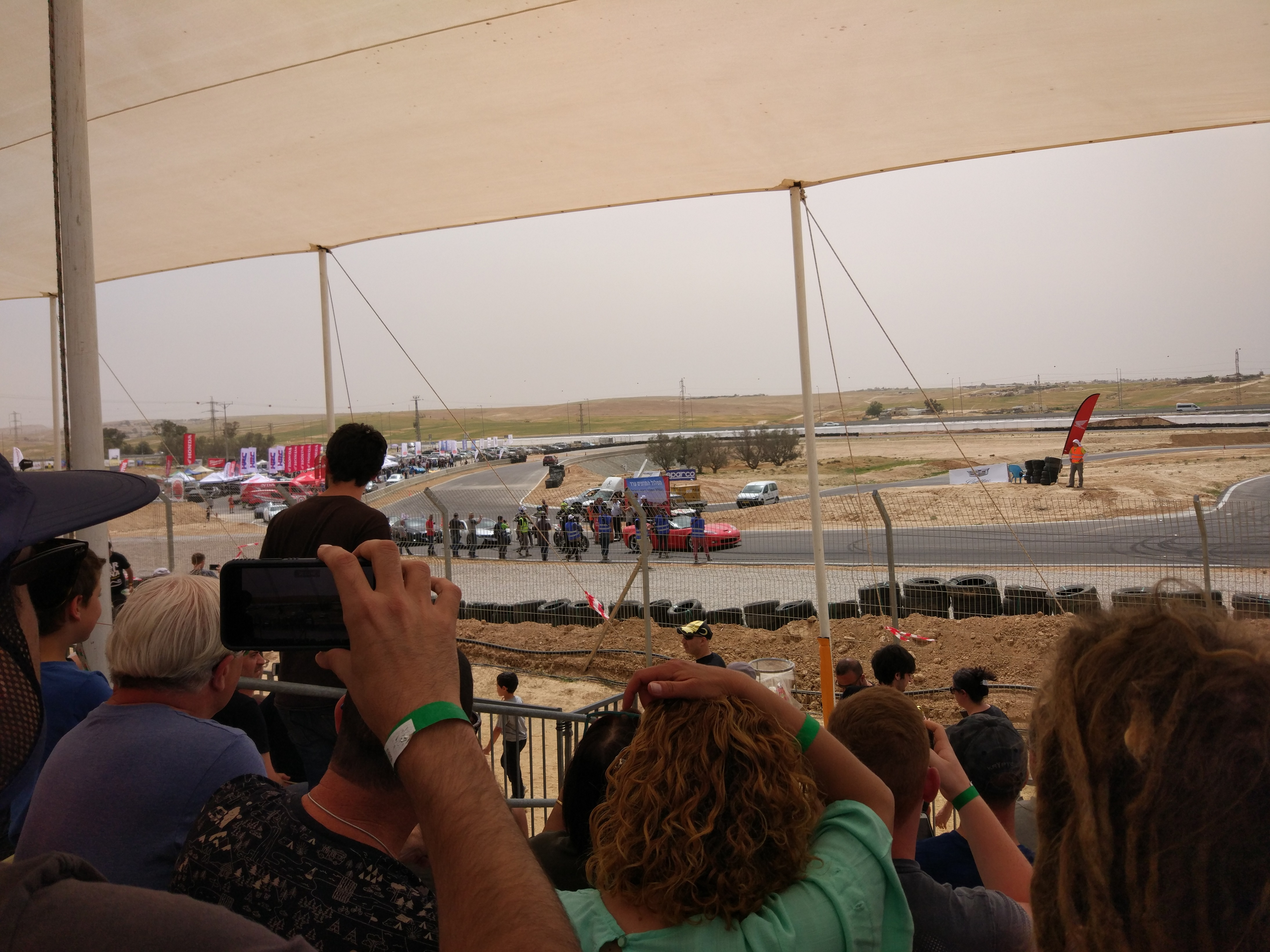 טקס הפתיחה של הפארק המוטורי בערד, אפריל 2018